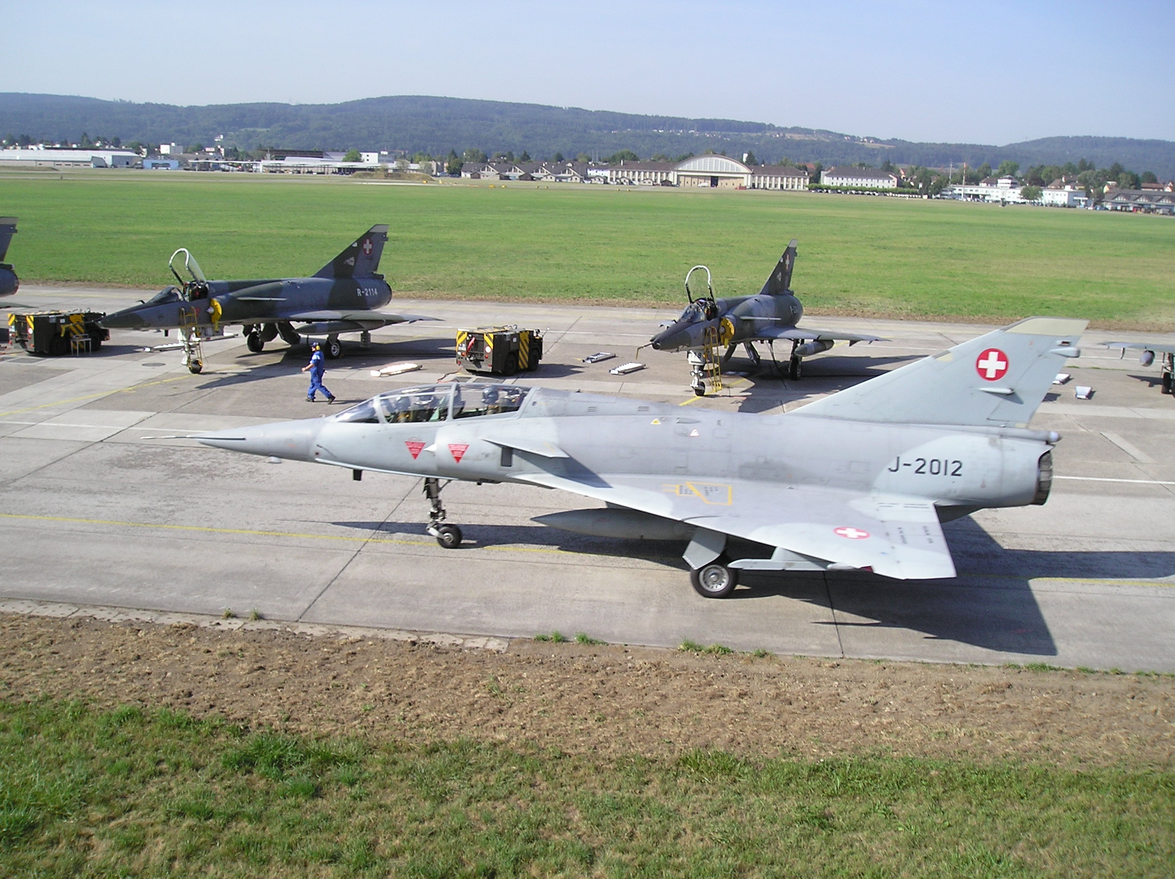 Mirage at Dübi